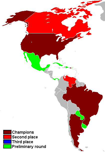 Nuevo mapa de participacion de Fiba Americas